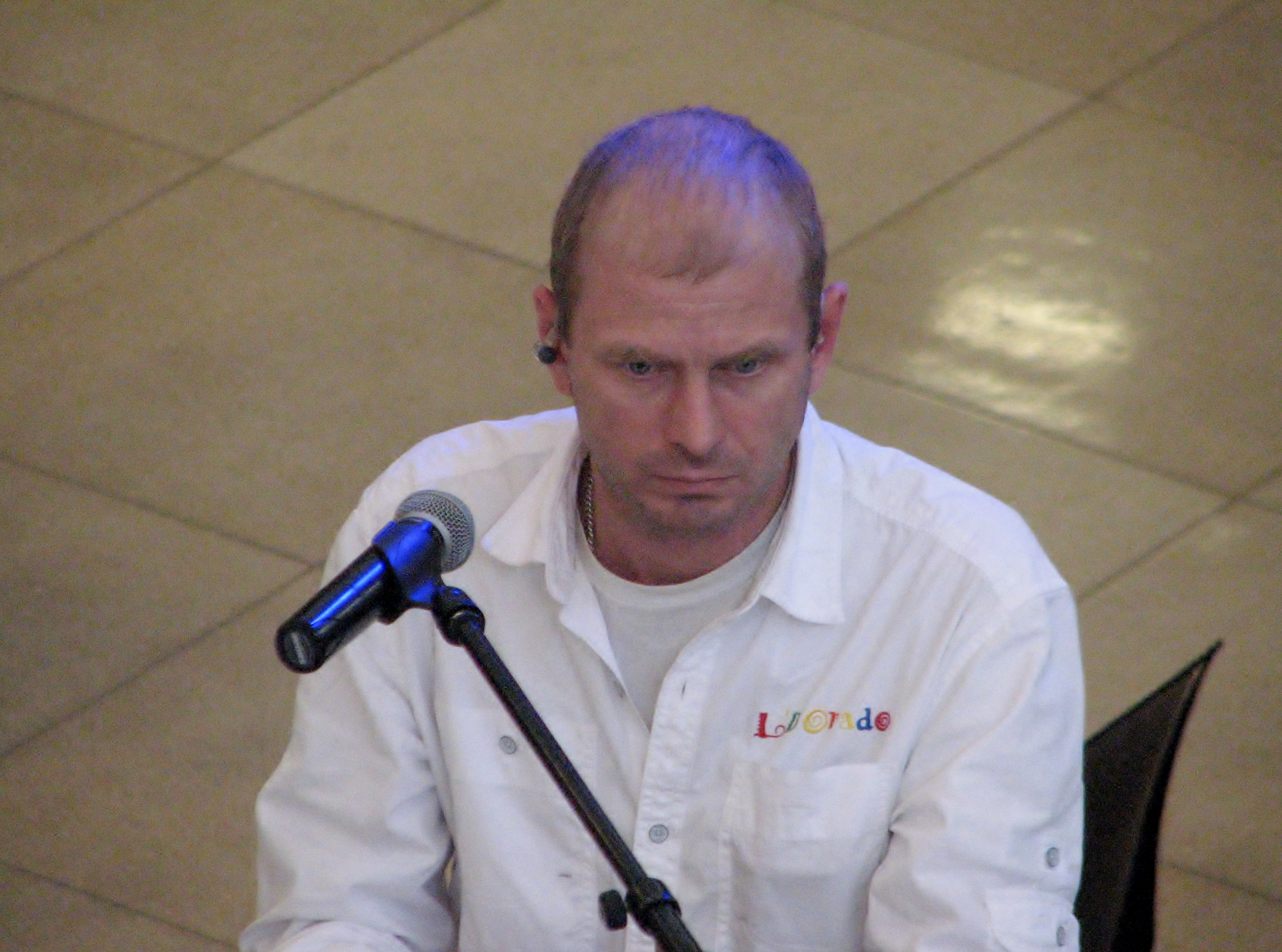 Andres Raag esinemas L'Dorado koosseisus Auriga keskuse sünnipäeval Kuressaares